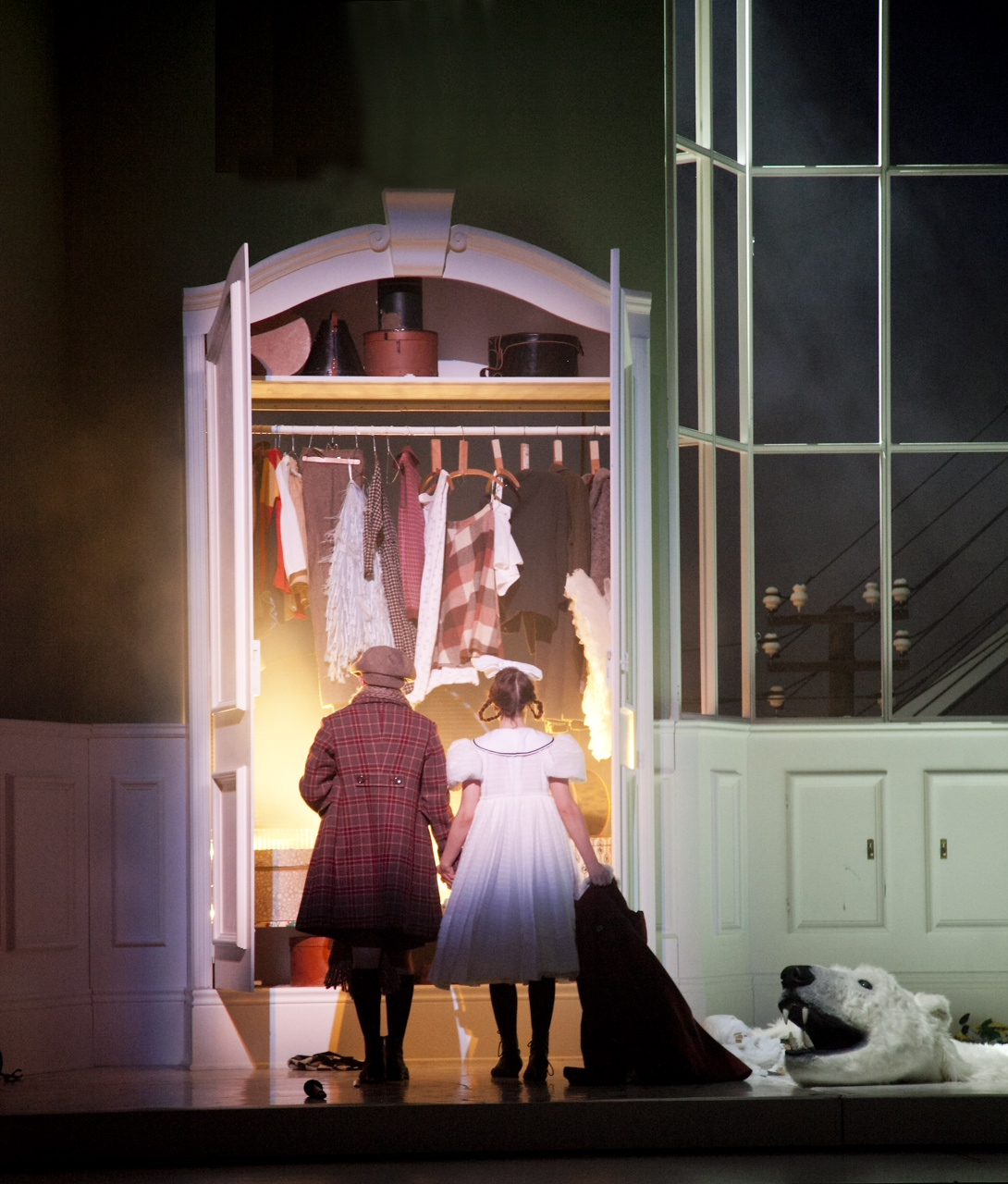 Foto von der Probe für die erste Inszenierung von Erich Kästners Stück „Klaus im Schrank oder Das verkehrte Weihnachtsfest“ am Staatsschauspiel Dresden 2013. Auf den Fotos zu sehen: Nina Gummich als Kläre und Jonas Friedrich Leonhardi als Klaus